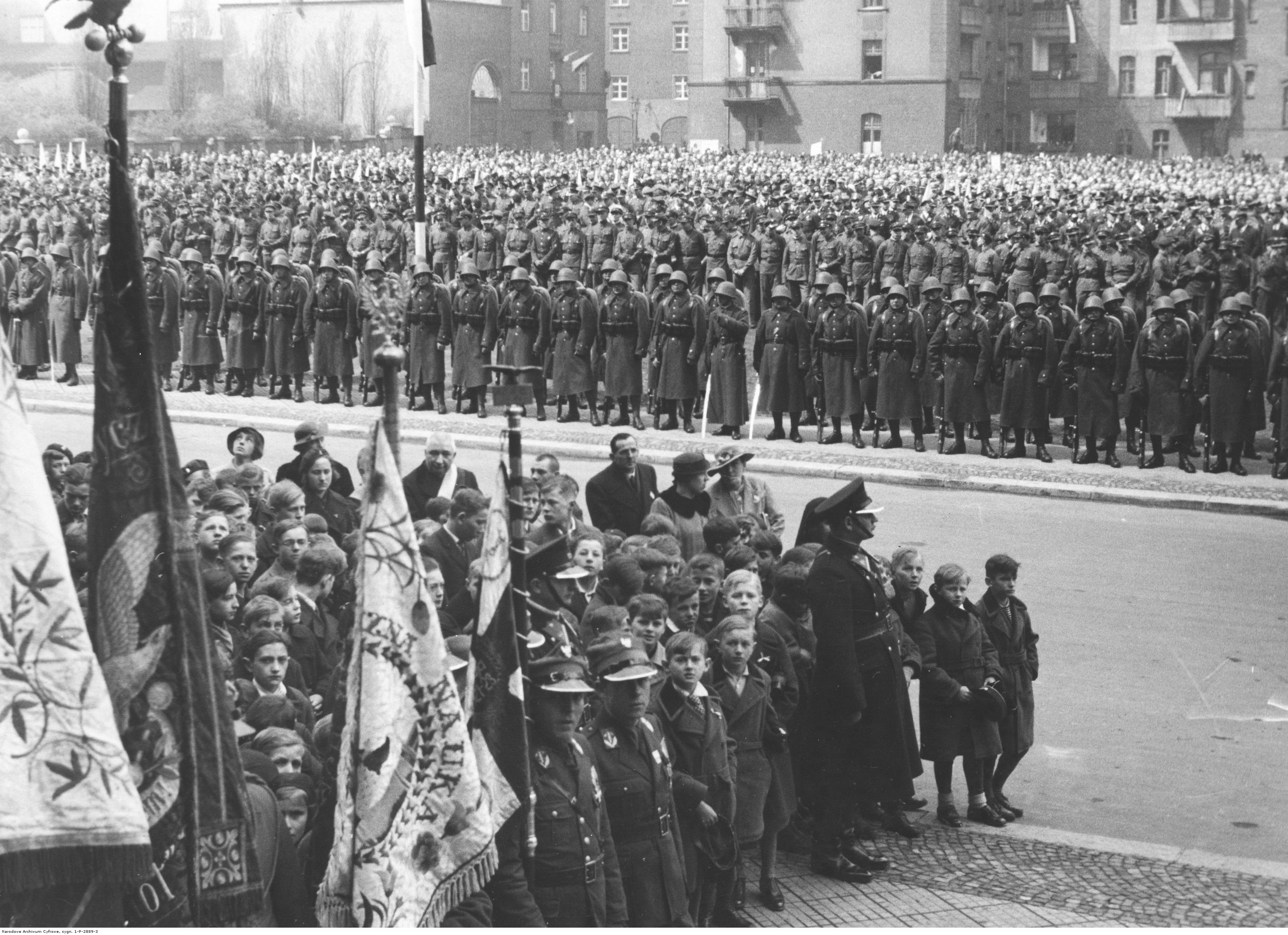 Uroczystości 3 Maja w Katowicach w 1935 r. Kompania honorowa 73 Pułku Piechoty garnizonu Katowice i organizacje szkolne podczas nabożeństwa. Koncern Ilustrowany Kurier Codzienny - Archiwum Ilustracji. Sygnatura: 1-P-2889-3